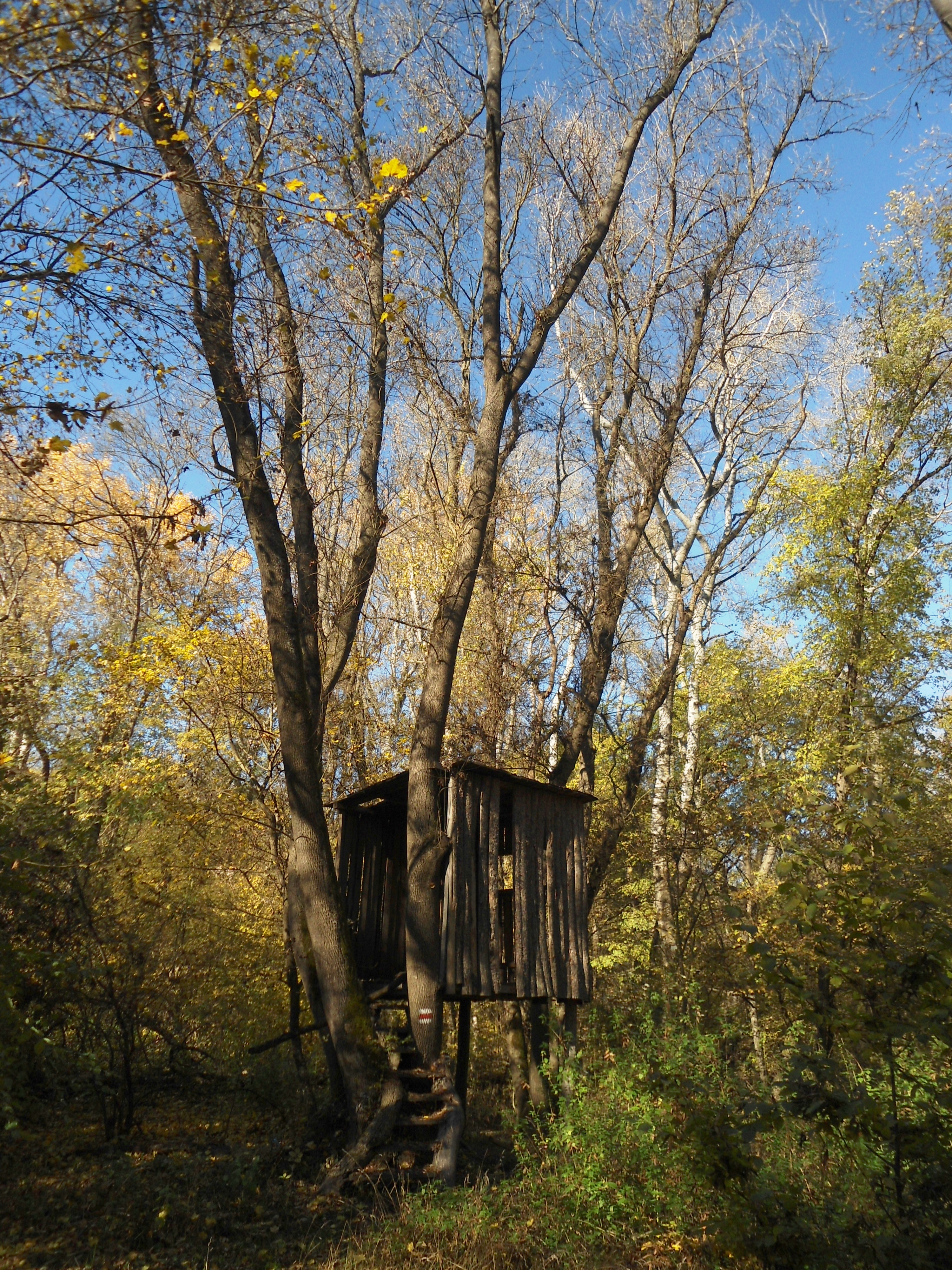 Вишката за наблюдение на птици в резерват Долна Топчия.